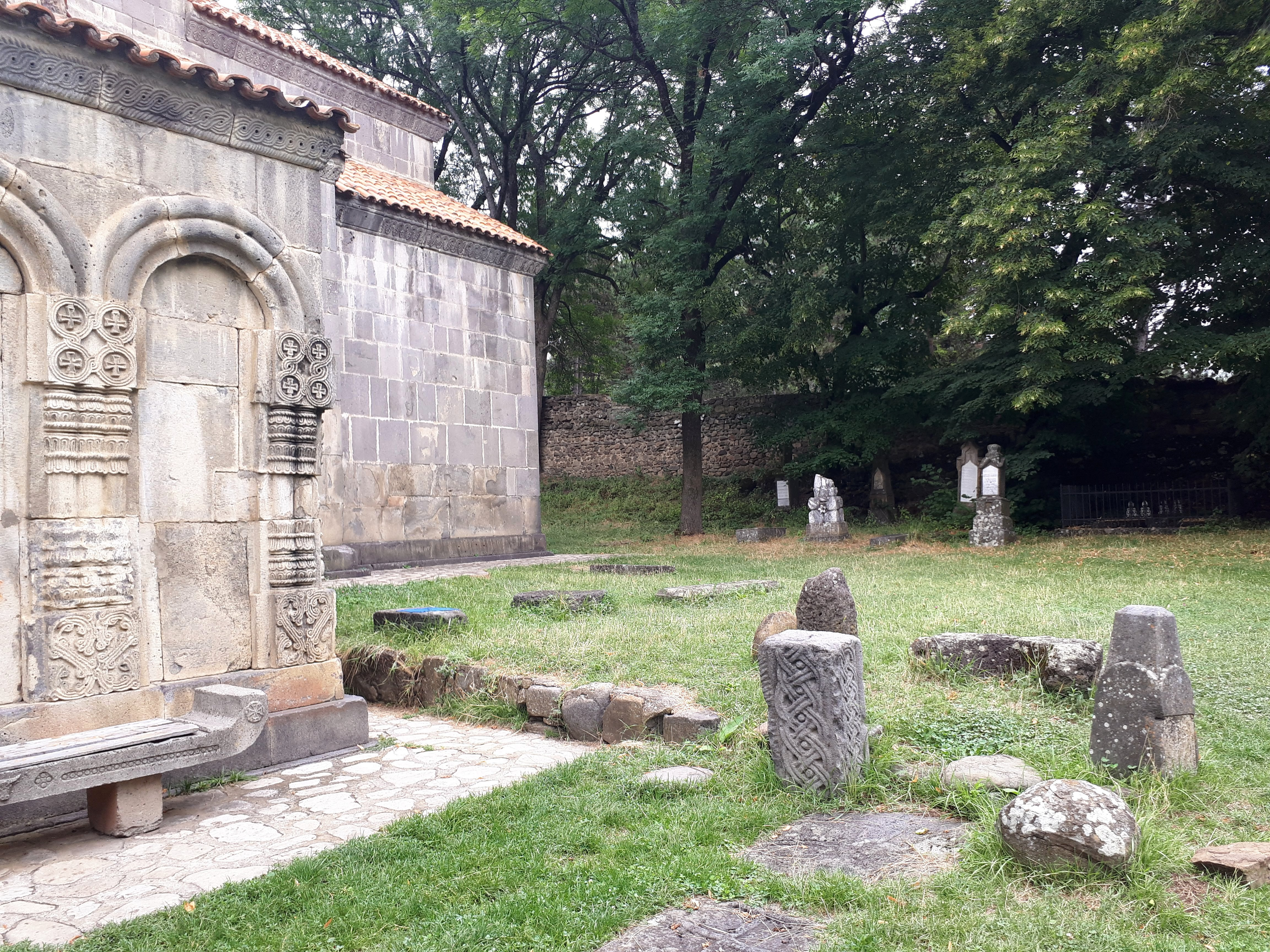 Manglisi Cathedral, Georgia